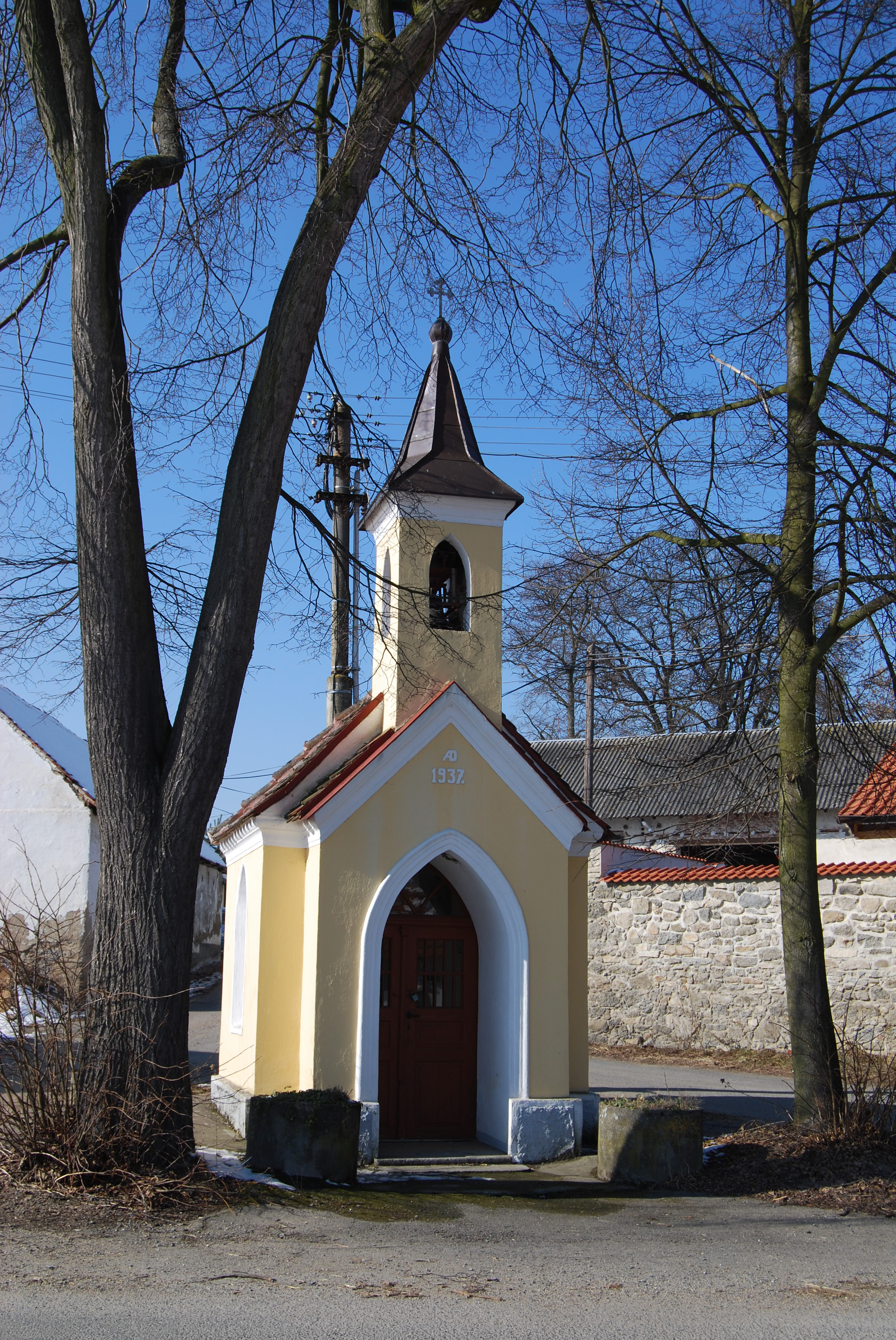 Kaple v obci z roku 1937. Zahrádka (Petrovice). Okres Příbram. Česká republika.